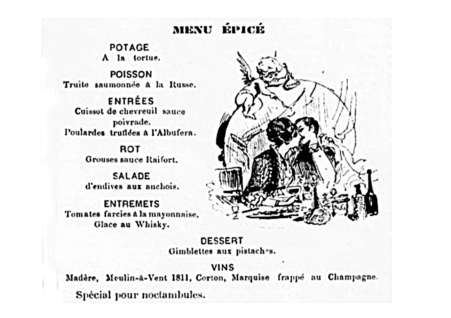 menue épicé dans La Vie Parisienne du 22 septembre 1883